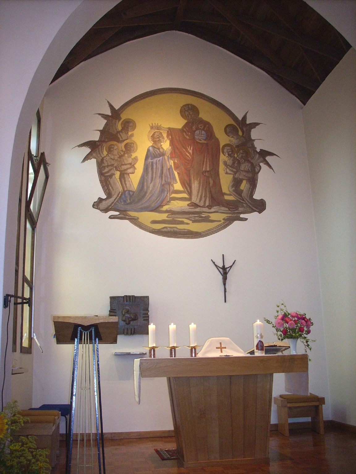 Klütz, Mariä Himmelfahrt Catholic Church